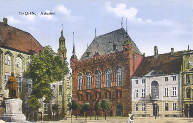 Ratusz, Dwór Artusa, Dom Harcerza i pomnik cesarza Wilhelma I (1904-1919) w Toruniu